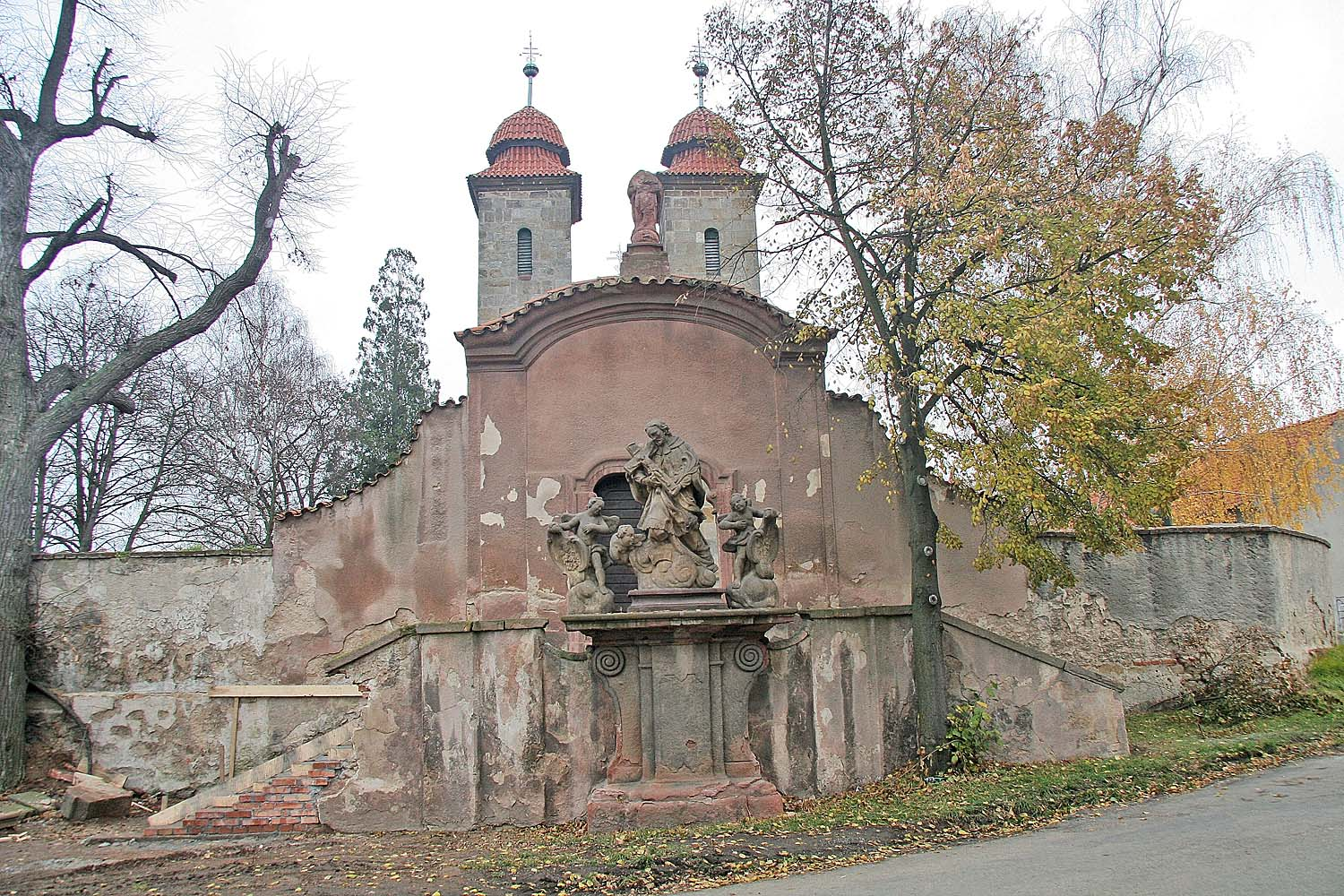 Pohled na vstupní bránu do areálu románské baziliky Nabnebevzetí Panny Marie v Tismicích autor: Prazak date: 17. 11. 2006